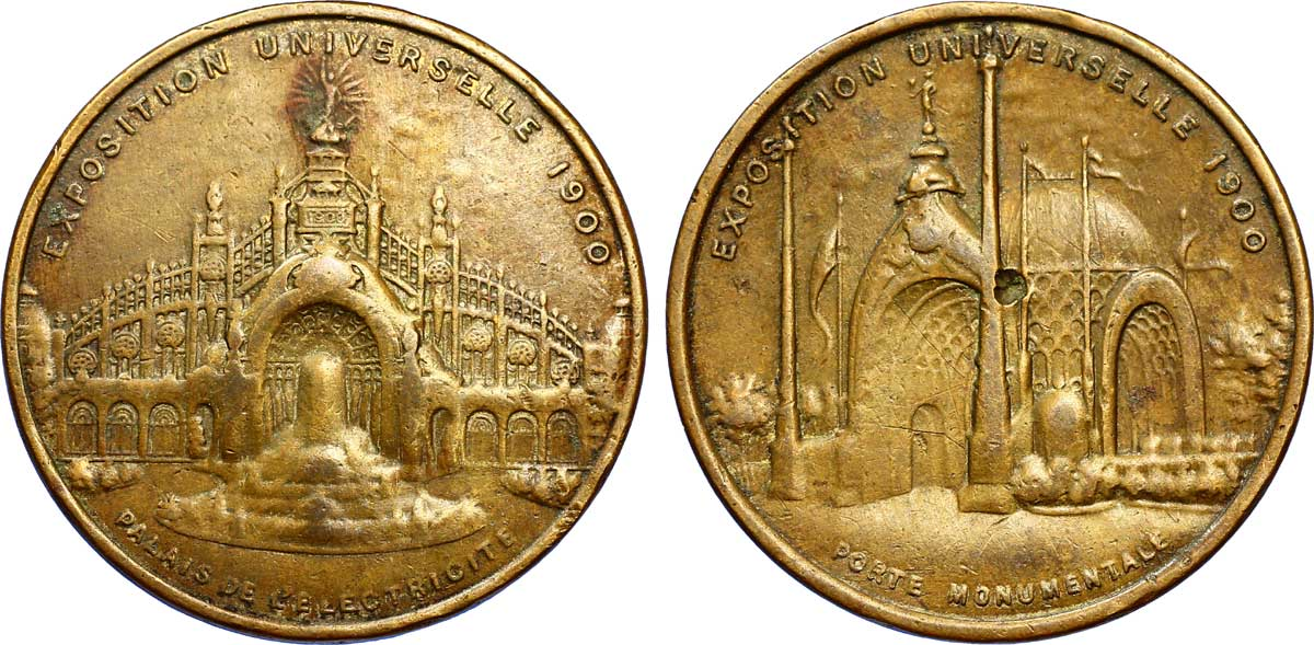 Jeton de l'Exposition Universelle de 1900 se tenant à ParisL'Exposition Universelle s'est tenue du 14 avril au 12 novembre 1900 avec plus de 50 millions de visiteurs et 83.000 exposants. Les expositions universelles ont été créées pour présenter les réalisations industrielles des différentes nations. Elles représentaient la vitrine technologique et industrielle des participants, témoignant du progrès au cours de la révolution industrielle. La première exposition universelle s'est déroulée à Londres en 1851. À l'origine, chaque pays disposait d'un espace réservé dans un pavillon central. À partir de 1867, des pavillons nationaux firent leur apparition. En principe, ils étaient attribués seulement s'il y avait des choses à présenter que le pavillon central ne pouvait accueillir. Ils ne tardèrent pas à se généraliser, les nations exposantes construisant des pavillons typiques de l'architecture de leurs pays. La compétition était omniprésente dans les expositions universelles, et des concours permettaient aux plus méritants d'obtenir des médailles bénéficiant d'un certain prestige. De nombreuses réalisations architecturales construites à l'occasion d'expositions universelles sont devenues par la suite des symboles des villes qui les ont abritées : la tour Eiffel à Paris, l'Atomium à Bruxelles, le Space Needle à Seattle, la Biosphère à Montréal.